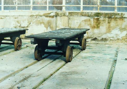 Kolej szklarniowa Akademii Rolniczej w Poznaniu - wózek typu Baborówko